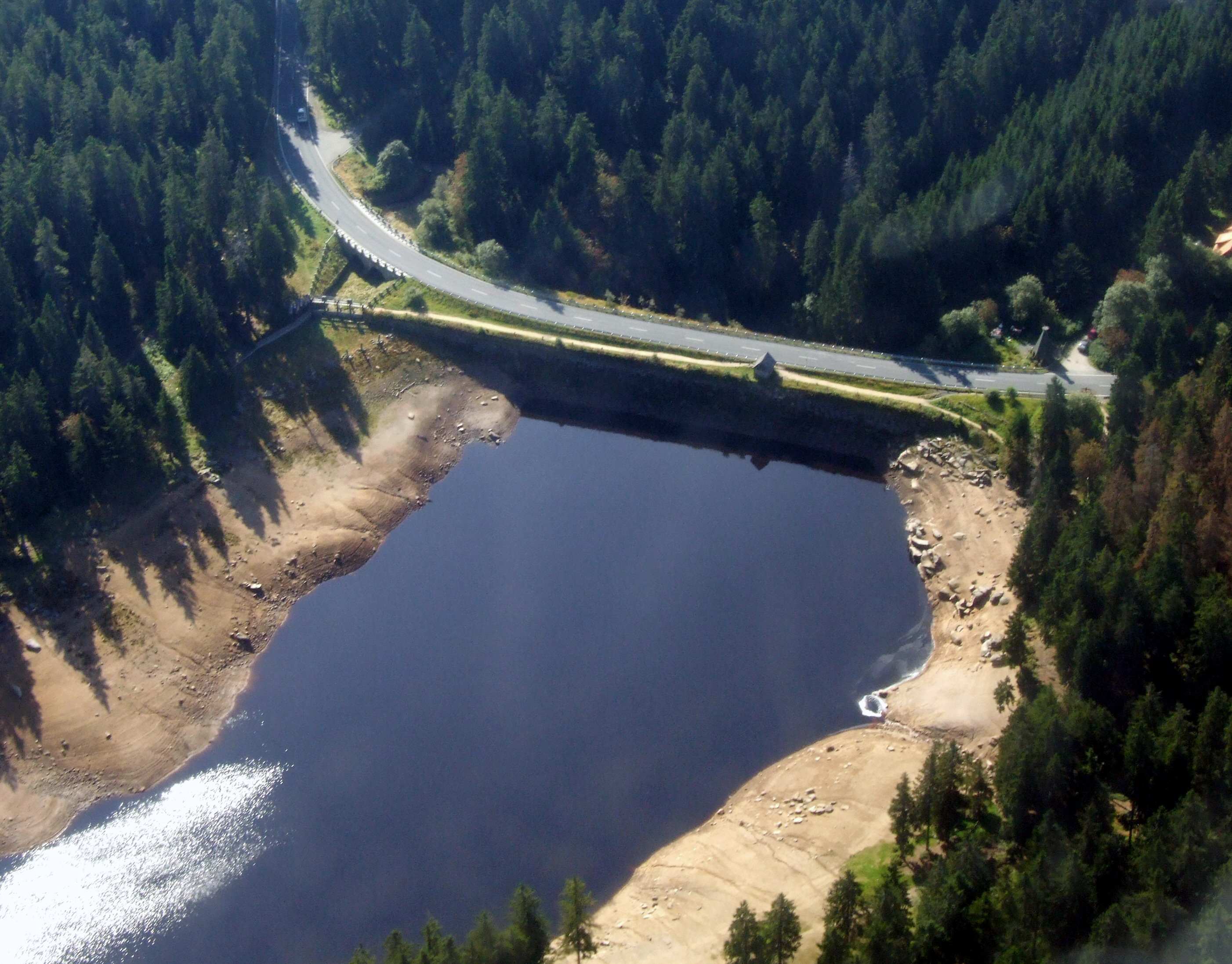 Oderteich: Luftaufnahme des Dammes aus Richtung Norden